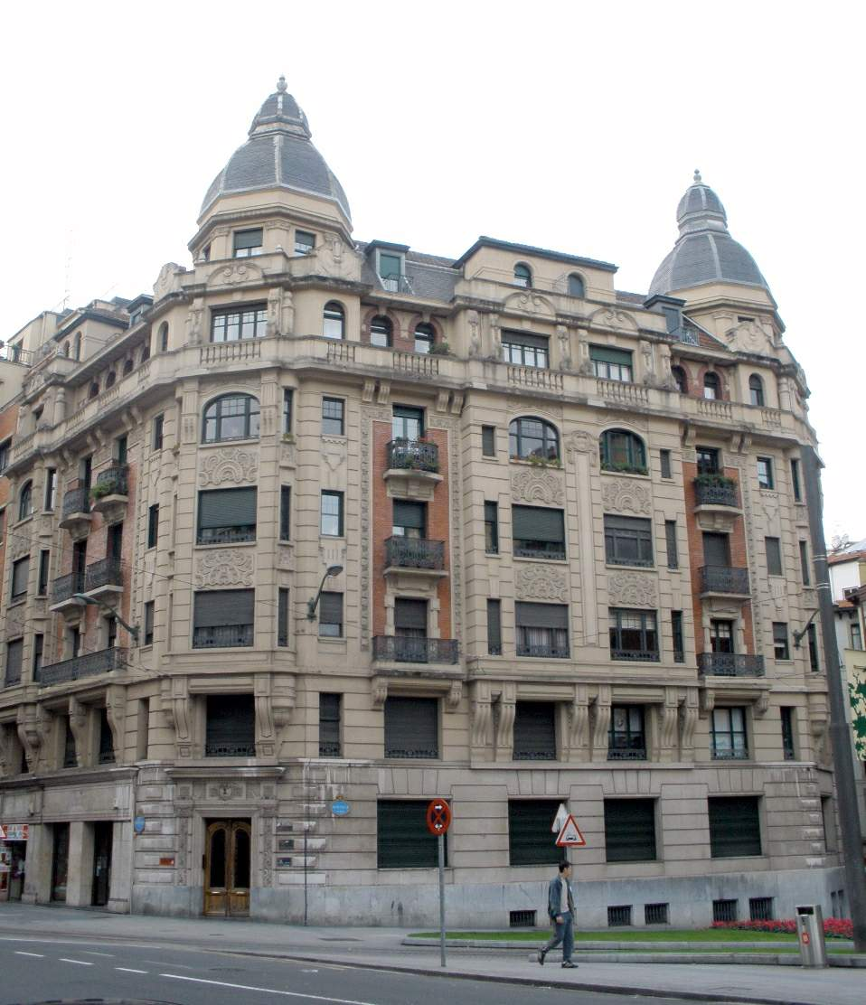 Bilbao - Plaza de Venezuela